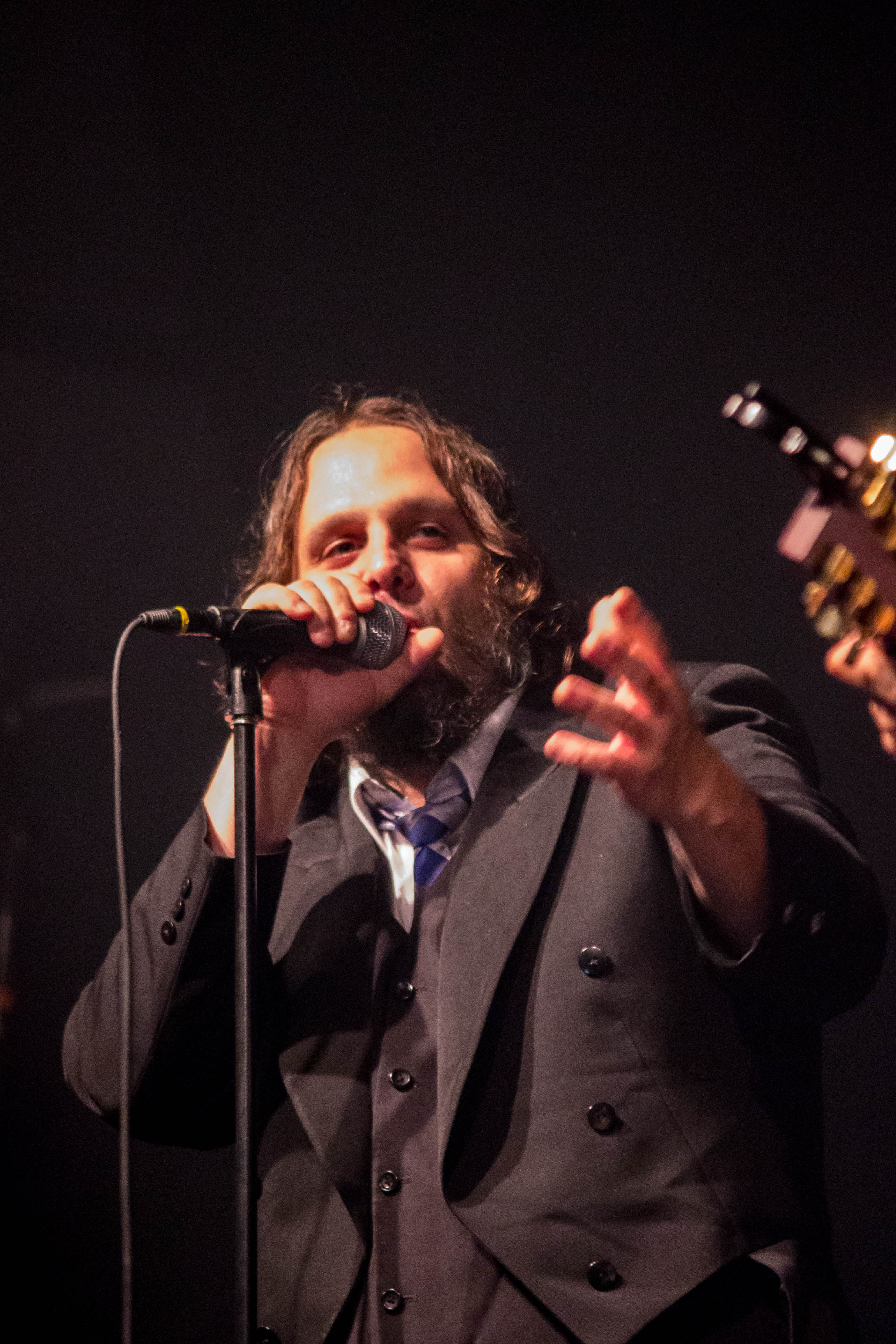 Le groupe « Les Cowboys fringants » au Festival international de la chanson de Granby 2013, place Johnson.